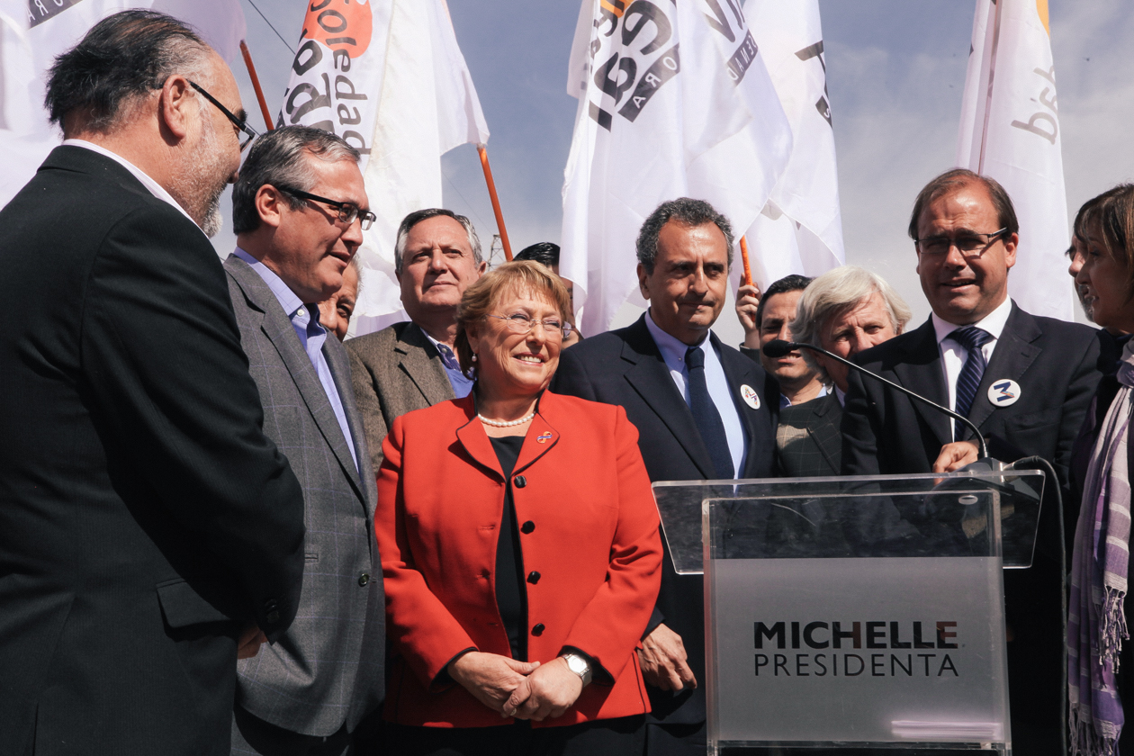 San Joaquín 30/09/2013